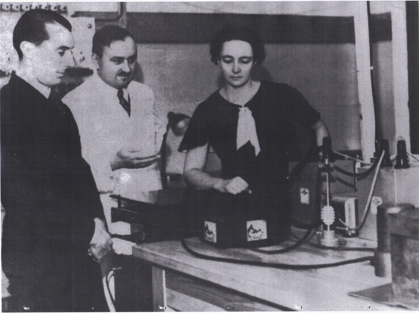 Prof. Cezary Pawłowski w towarzystwie Ireny i Fryderyka Joliot-Curie w Pracowni Fizycznej Instytutu Radowego w Warszawie (1936)